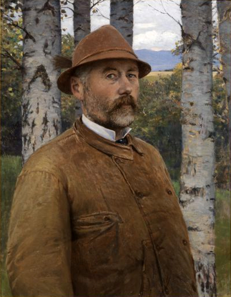 Szinyei Merse Pál: Önarckép (1897)